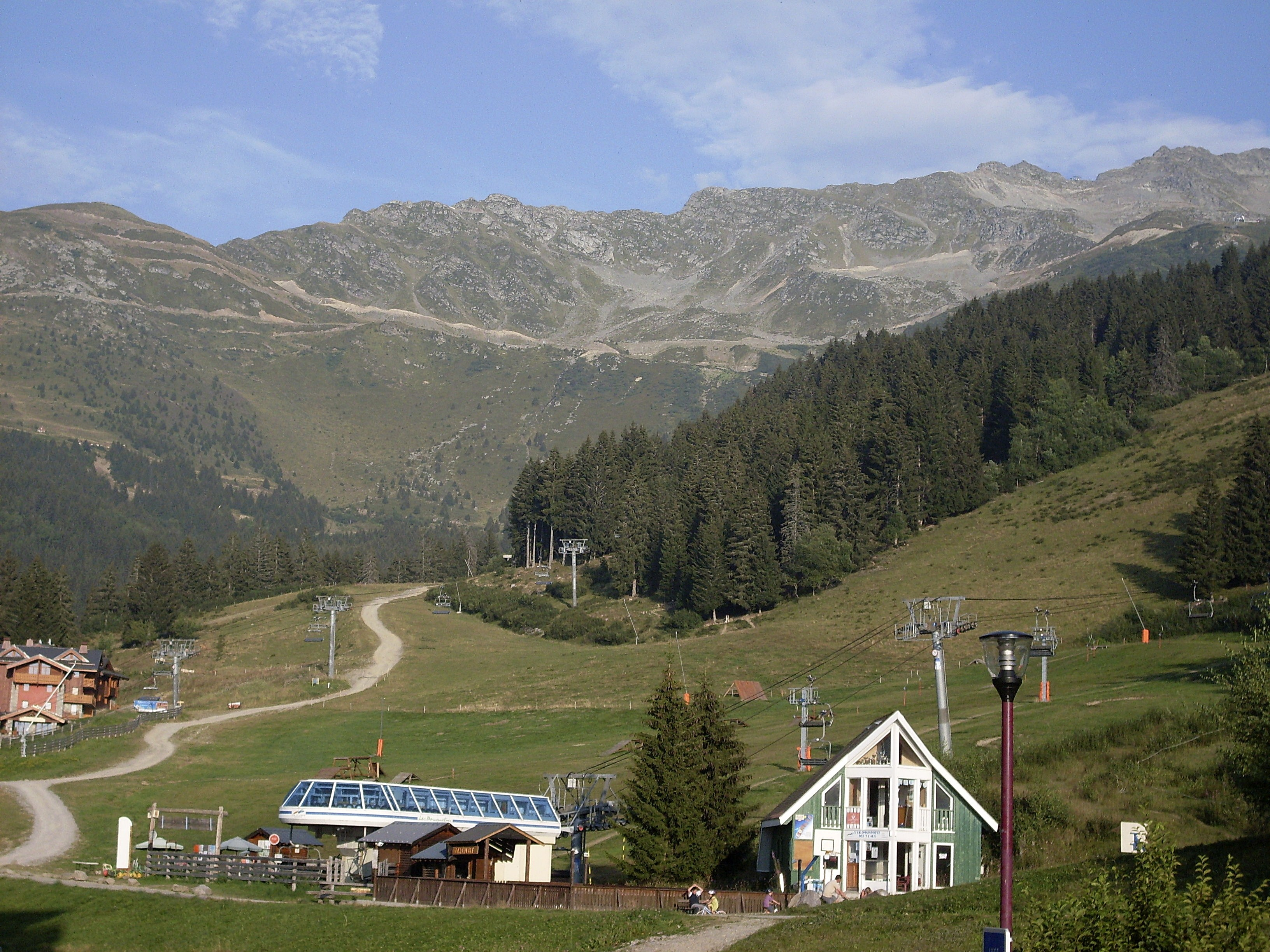 Vue partielle de Prapoutel en Isère